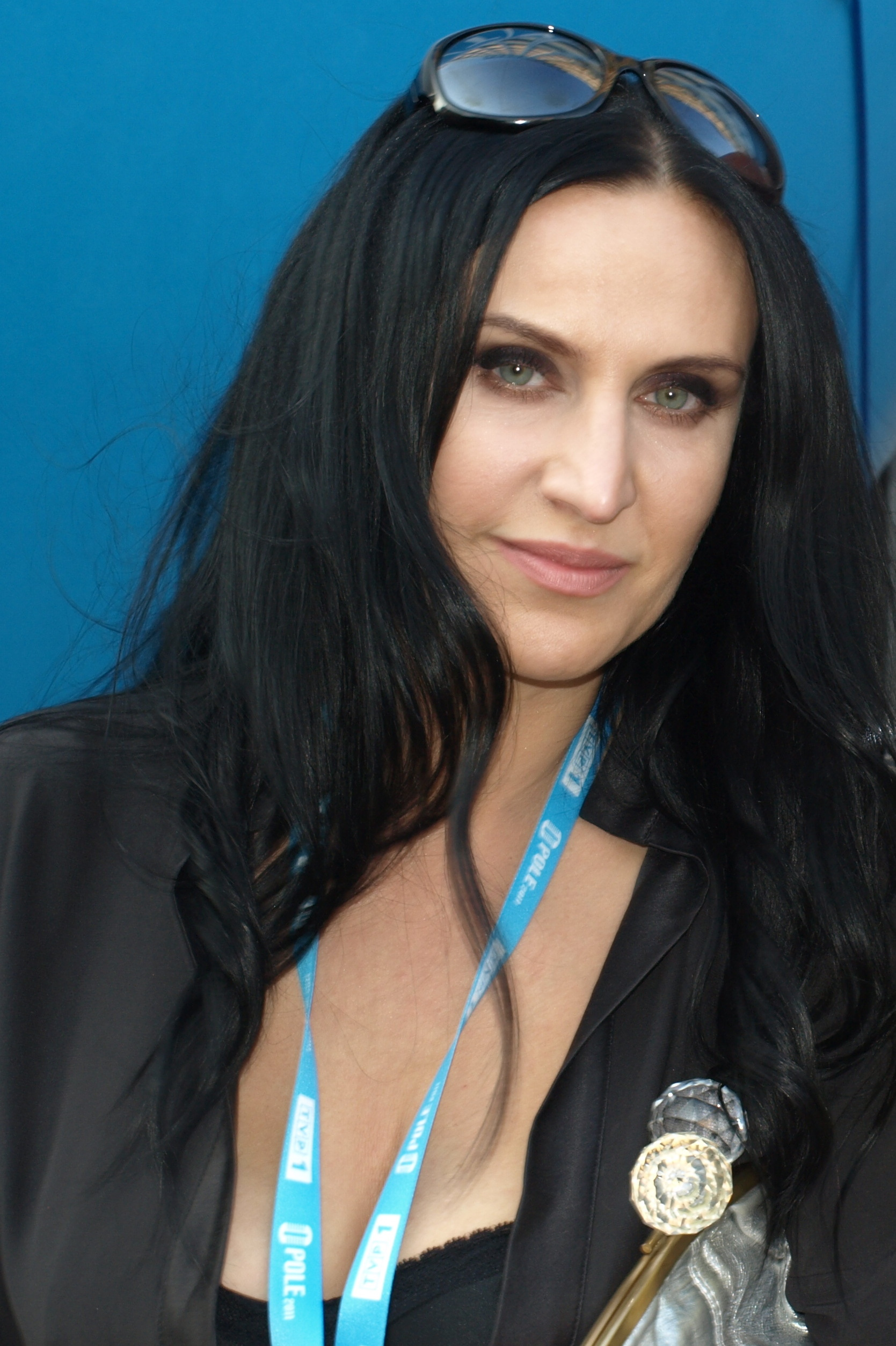 Kayah w 2011 roku